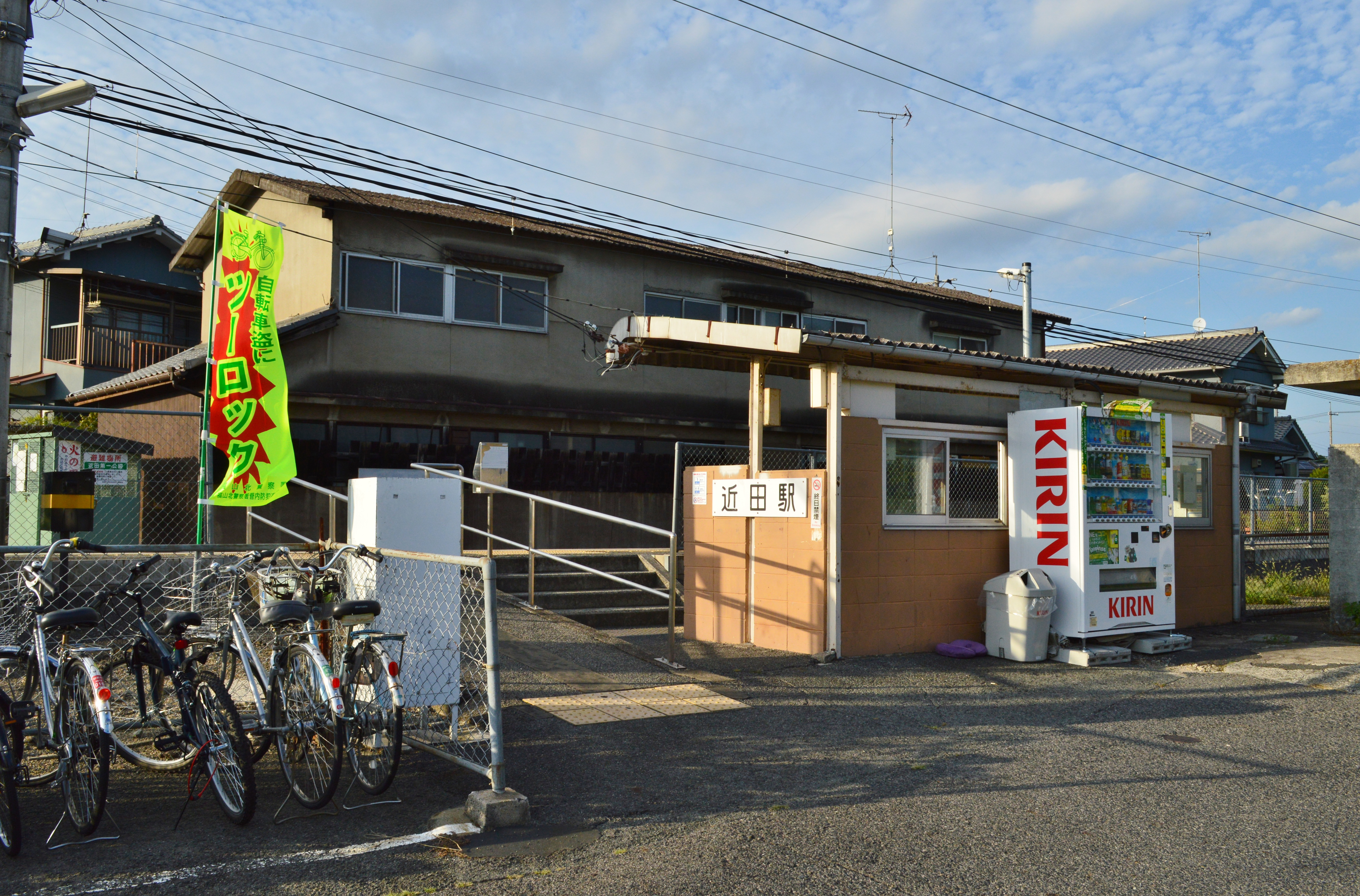 近田駅 駅舎